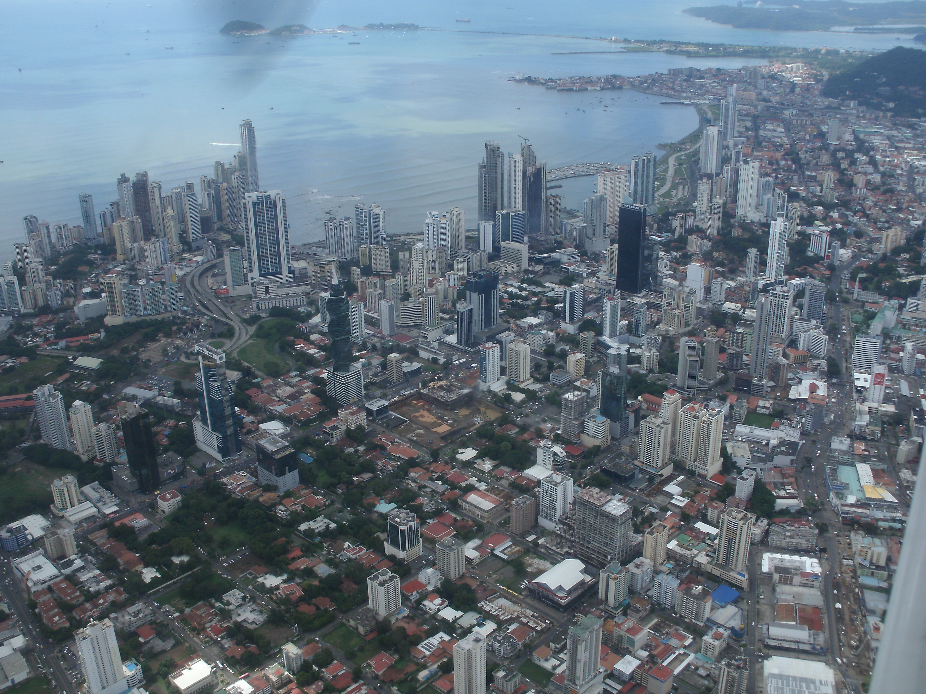 Panamá City